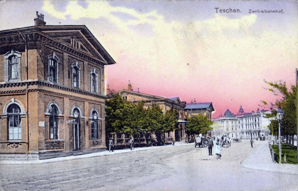 Teschen, Bahnhof